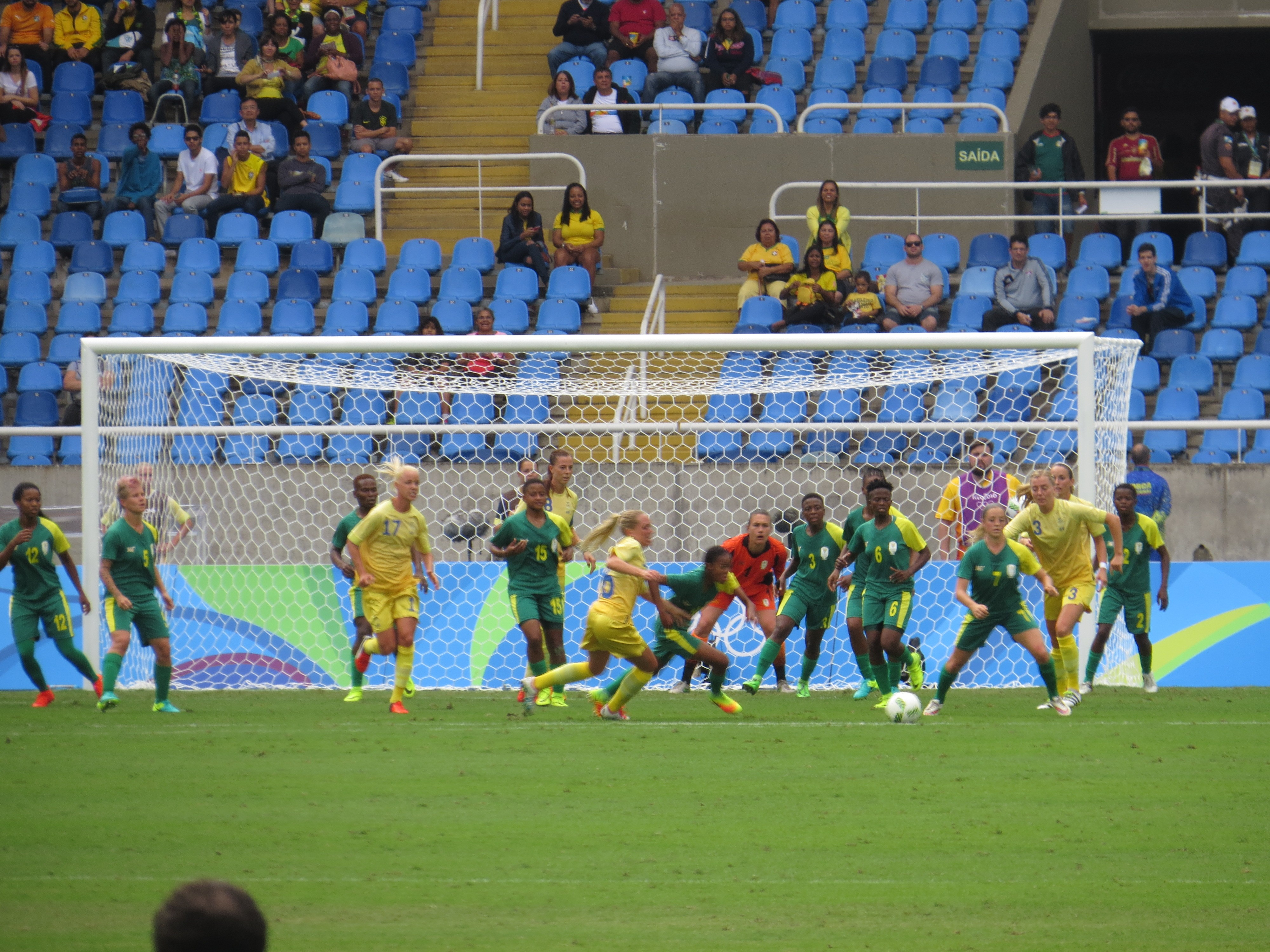 Futebol feminino Suécia 1 x0 Africa do Sul 03/08/16